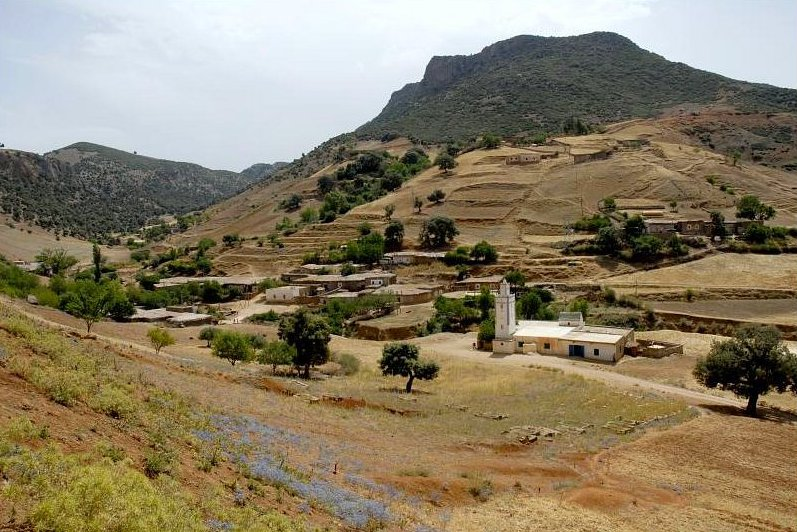 Tazekka